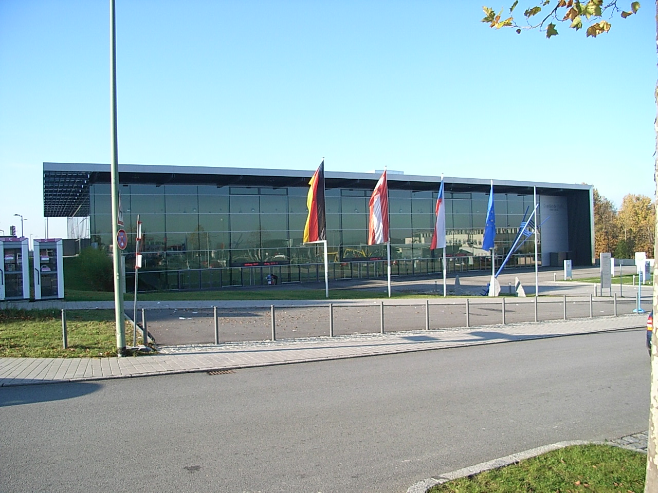 Beschreibung: Dreiländerhalle Passau Quelle: Bild selbst erstellt Datum: 7. November 2006 Autor: Konrad Lackerbeck